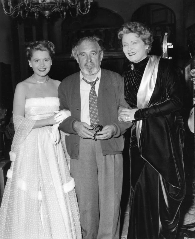 Aufnahmen von der Dreharbeiten des Film "Alles für Papa" (Regie Karl Hartl), der in den Göttinger Filmateliers im Oktober bis Dezember 1953 entstand. Lustige Szene mit Hannerl Matz, Regisseur Karl Hartl und Olga Tschechowa während einer Drehpause.